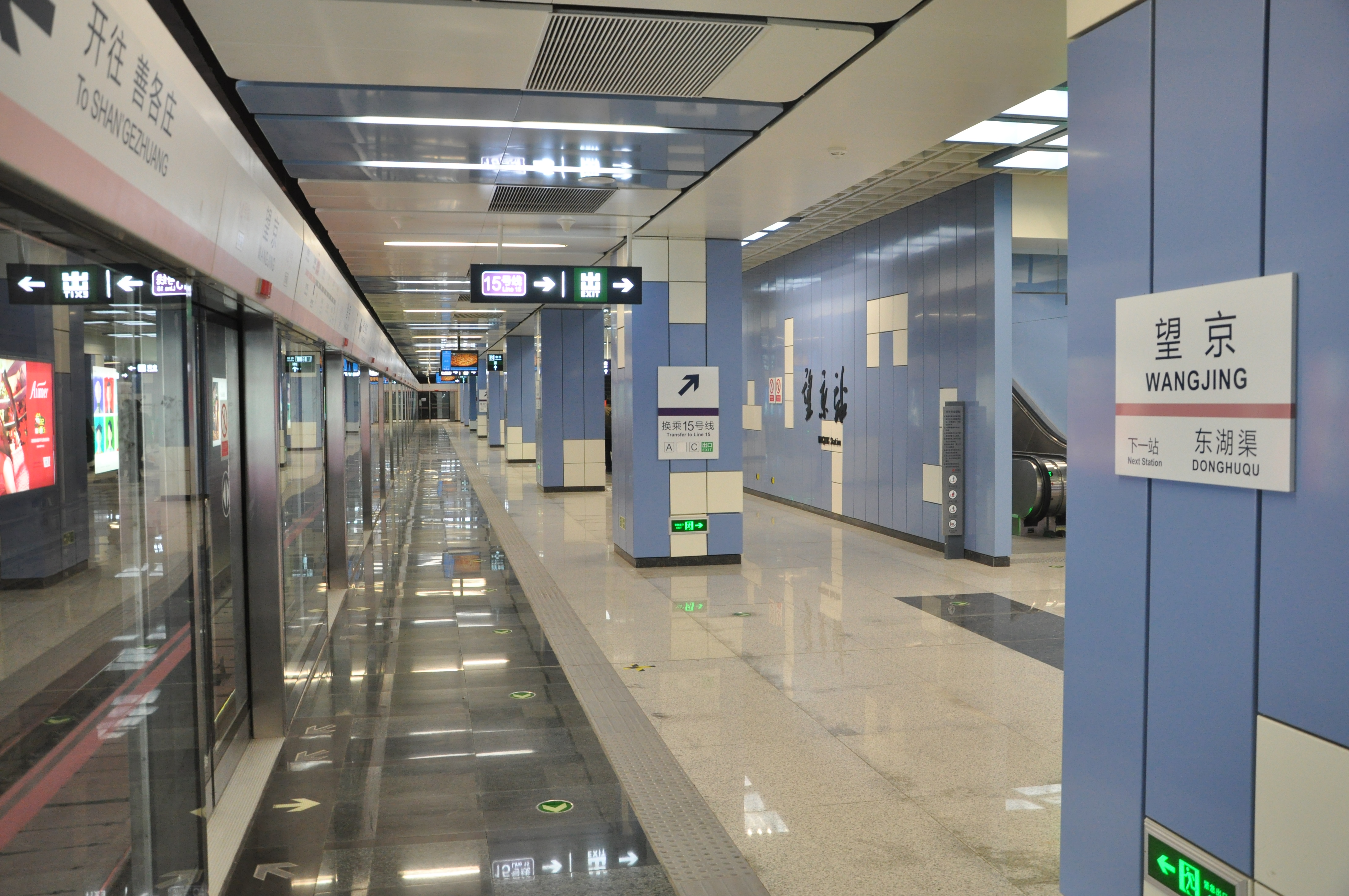 北京地铁14号线望京站站台